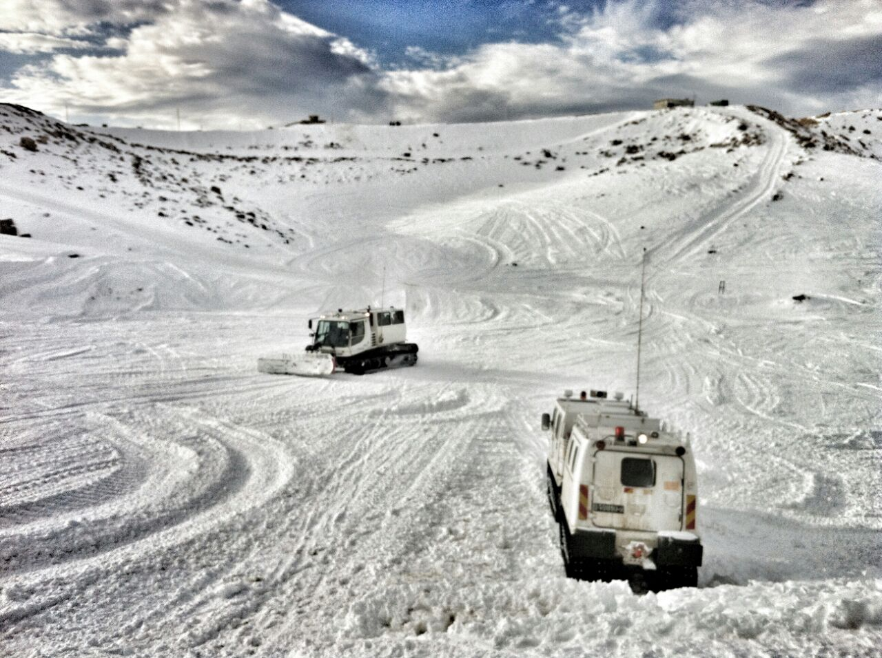 ששששש